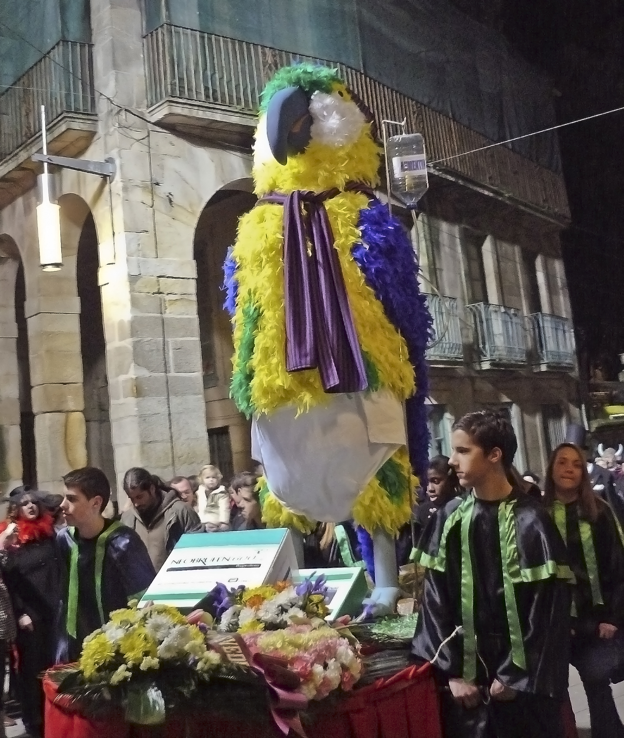 Loro Ravachol enfermo dunha sobredose de viagra- Entroido 2008 en Pontevedra